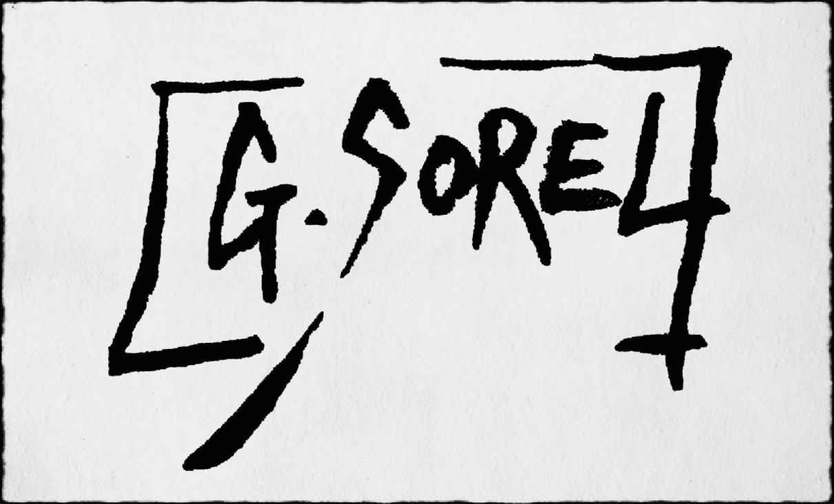 Guillaume Sorel en dédicace dans la cour du château de Comper, lors des 8èmes Rencontres de l'Imaginaire en 2012.